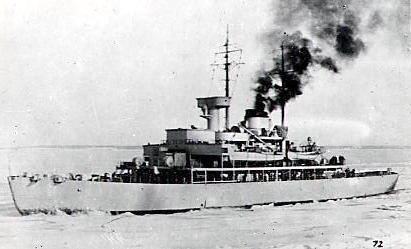 Der deutsche Eisbrecher Castor